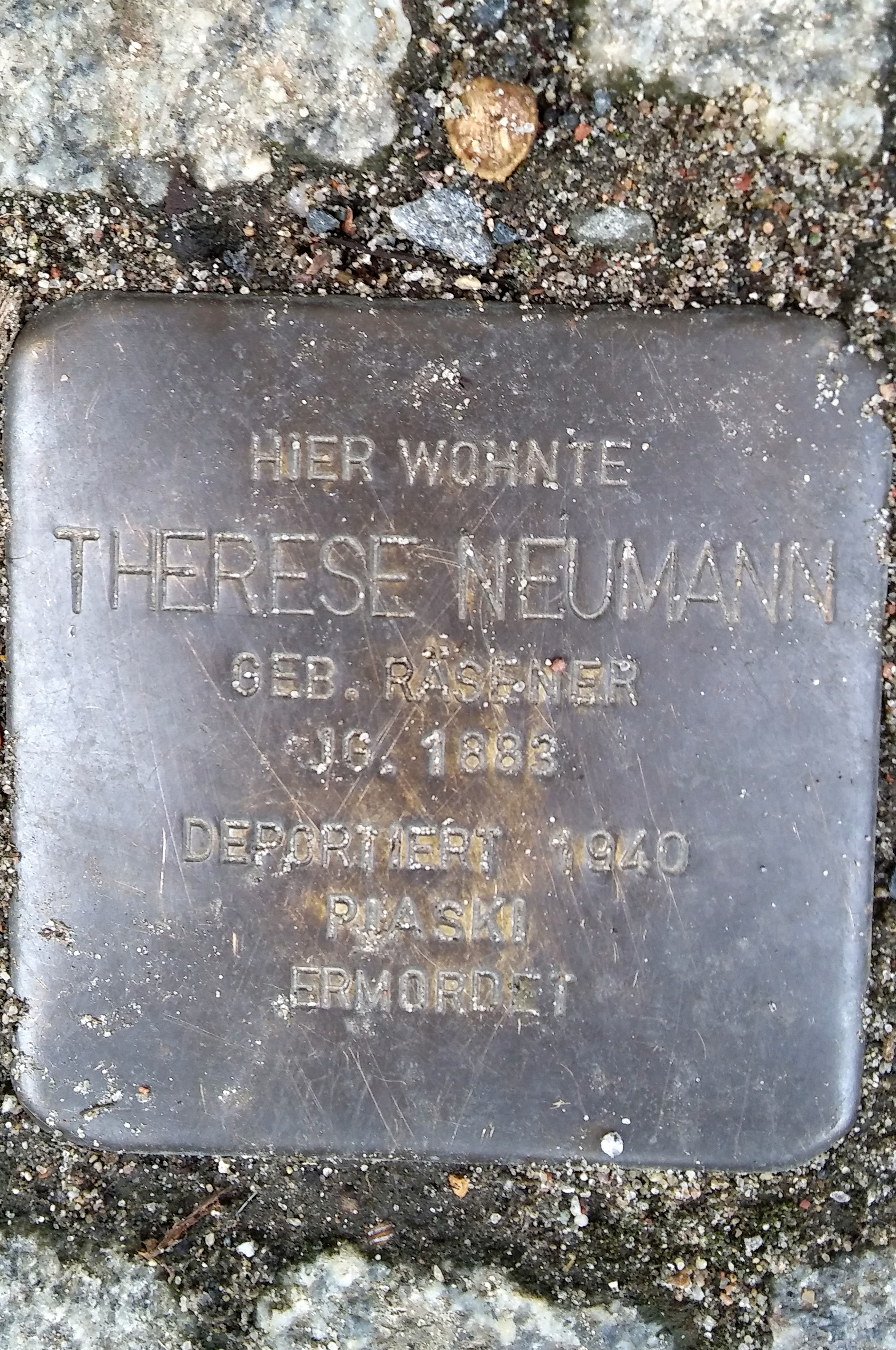 Stralsund, Frankenwall 9, Stolperstein Therese Neumann